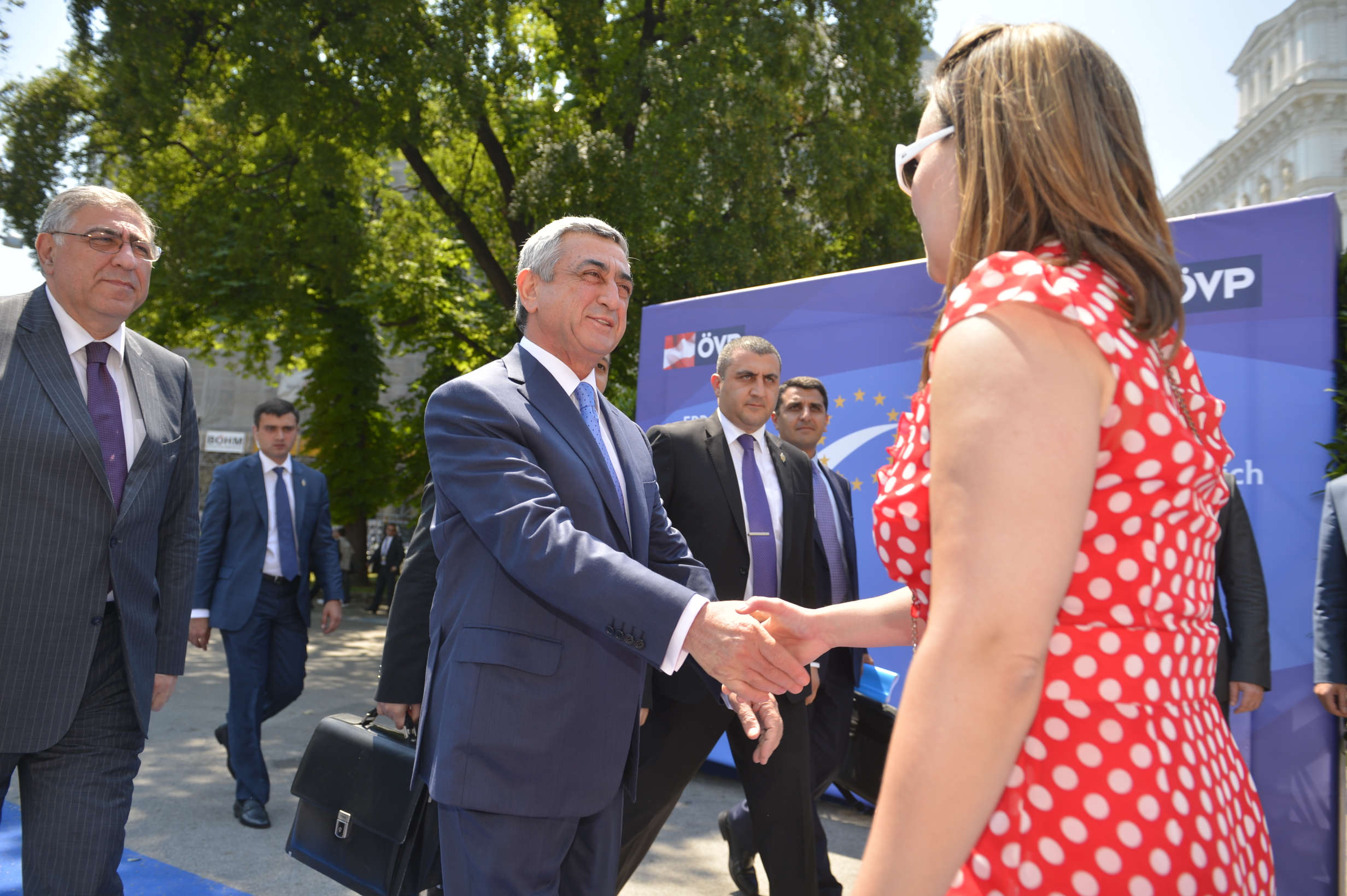 Fotograf: David Plas